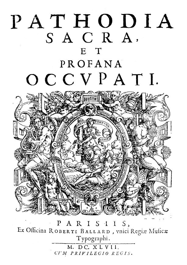 Page de titre de la Pathodia sacra et profana de C. Huygens (1647).